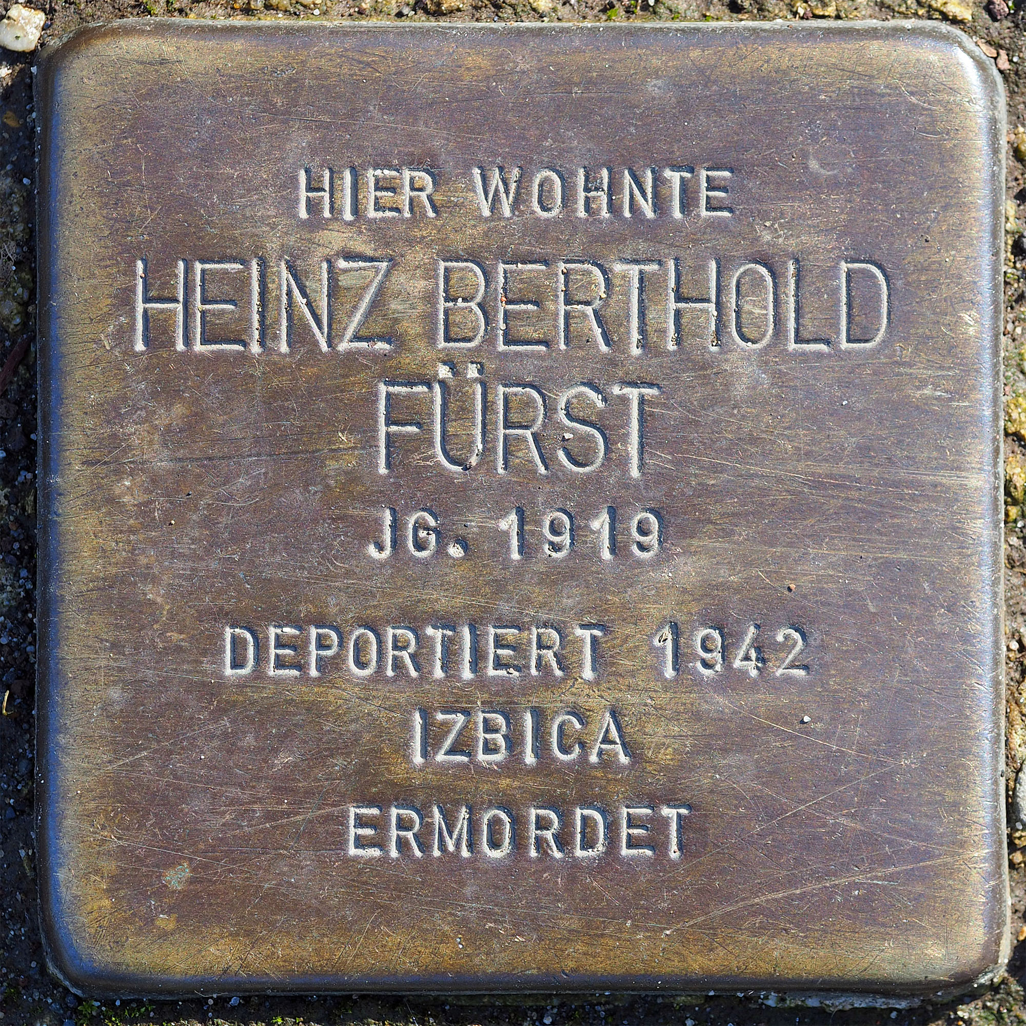 Stolpersteine MG: Fürst, Heinz Berthold